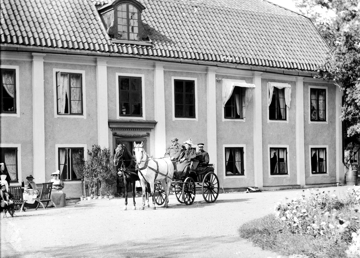 Huvudbyggnaden på Hallkveds herrgård, Funbo socken, Uppland 1896. Persistent URL: Upplandsmuseet: OD0188 Flickr data on 2011-08-24: Tags: Uppland, Hallkved, Funbo, Sweden, Osti, Henri Osti License: CC BY 2.0 User: Upplandsmuseet Upplandsmuseet Länsmuseum för Uppsala län